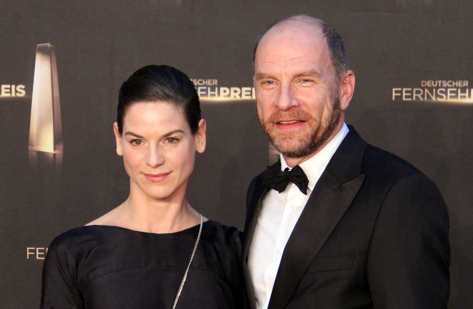 Bibiana Beglau und Götz Schubert beim Deutschen Fernsehpreis 2012